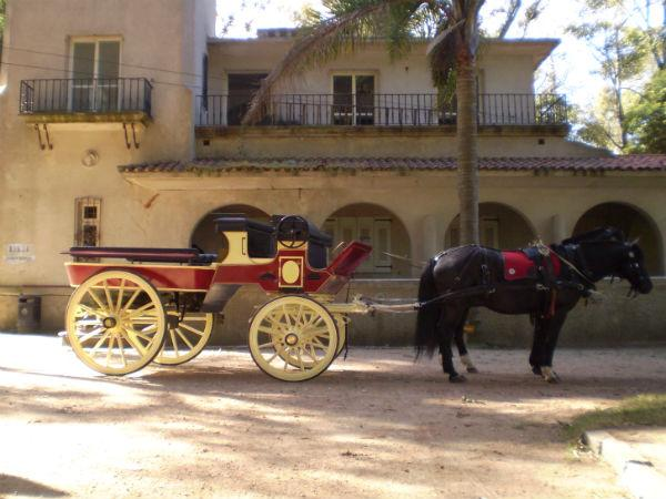 Fachada del Edificio del museo Fernando García